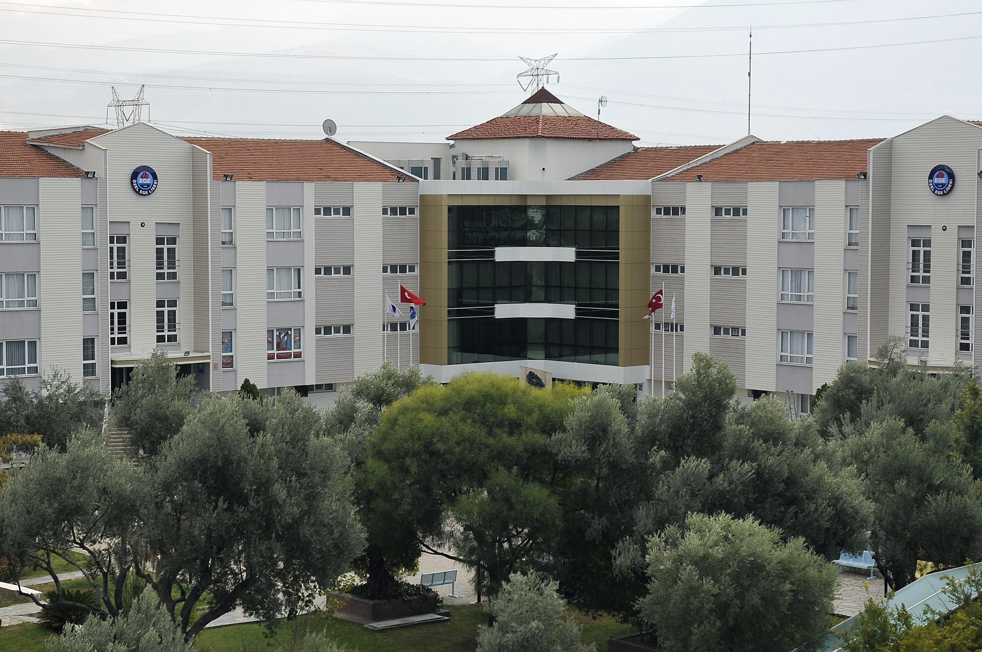 Ege Lisesi'nin ön cephe yenilemesi sonrası çekilen fotoğrafı, 1 Kasım 2014.